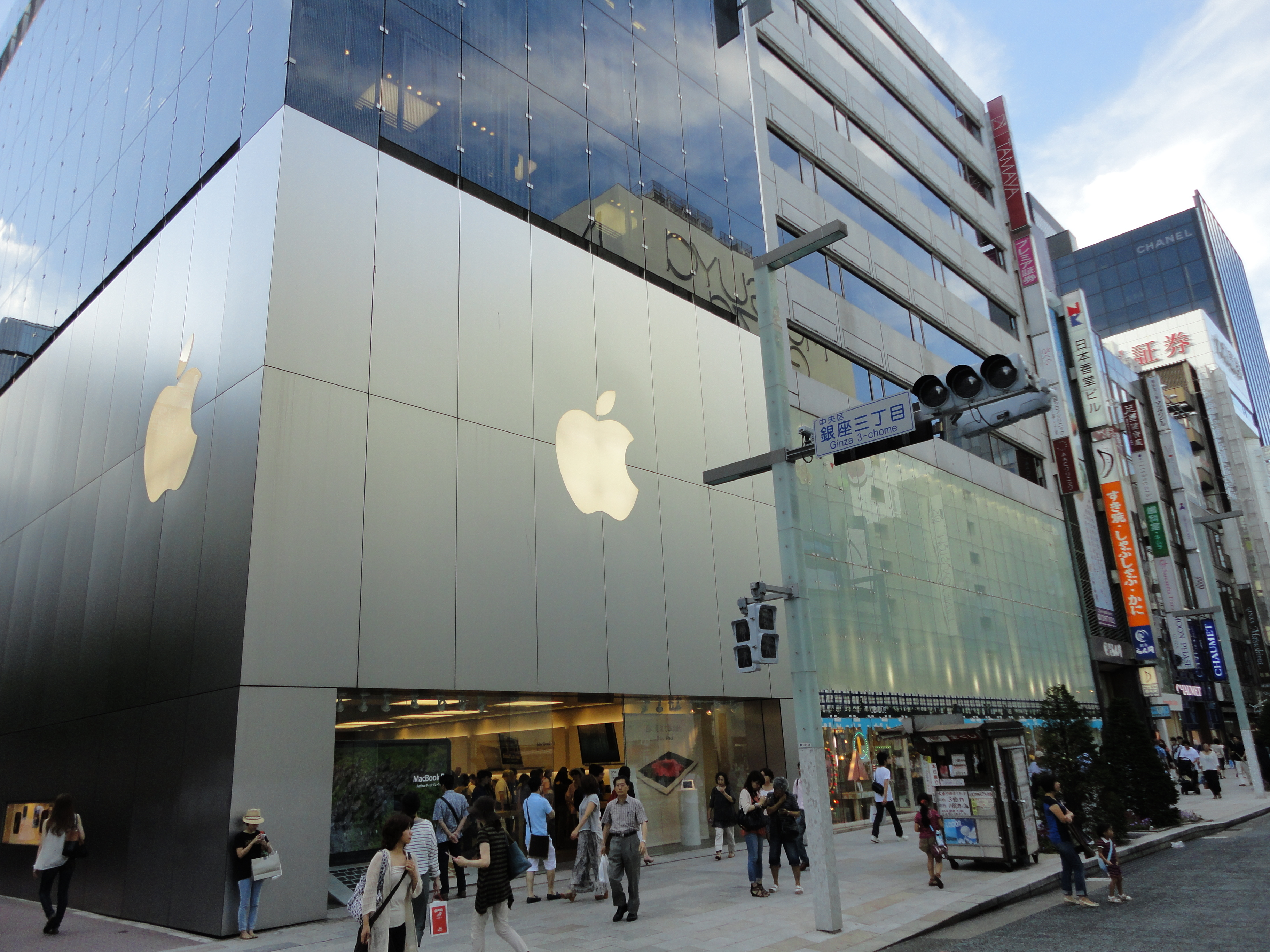 銀座